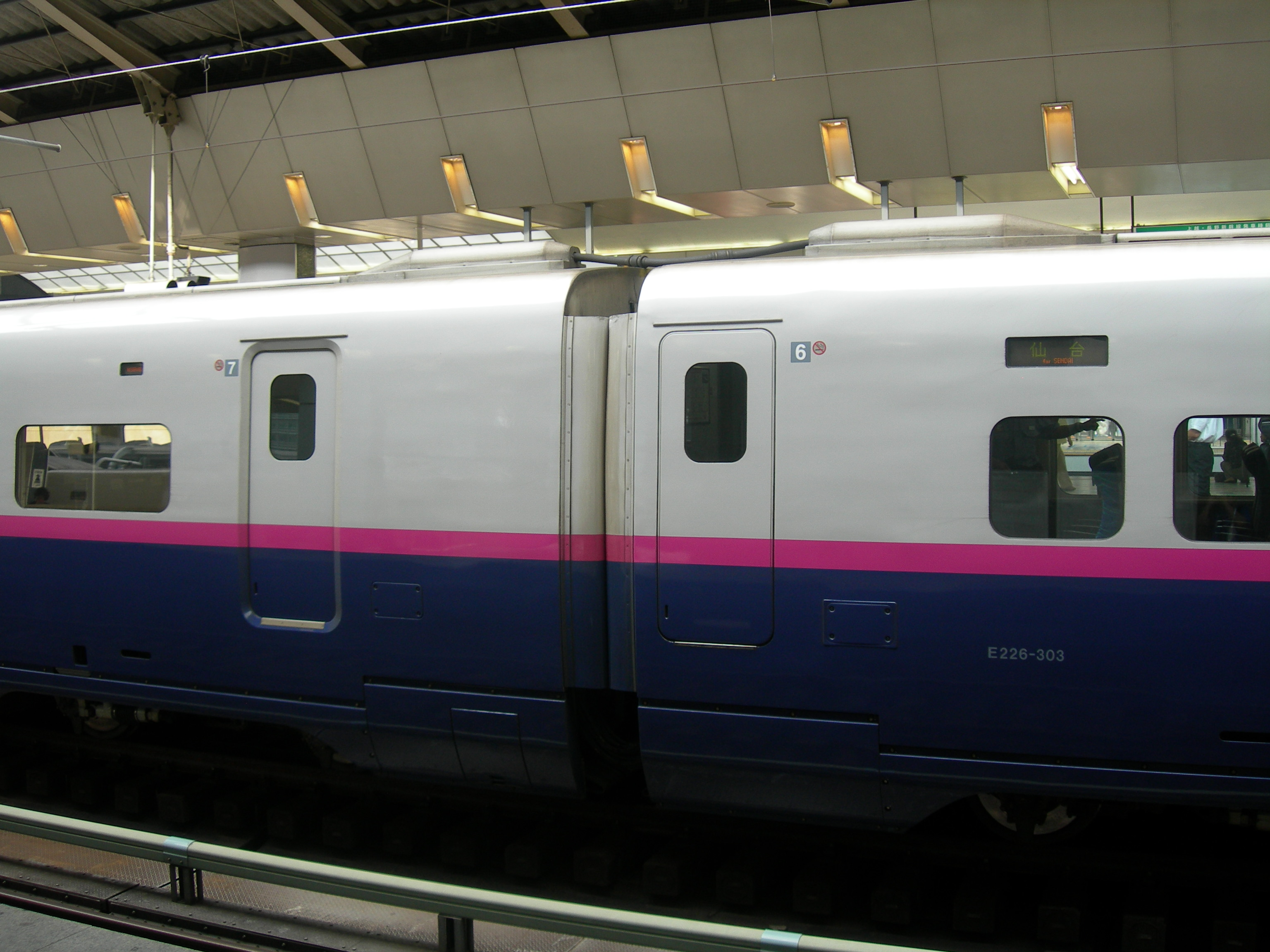 1000番台と同等の外観のE225形100番台（7号車、左）とE226形300番台（6号車、右）の連結部分